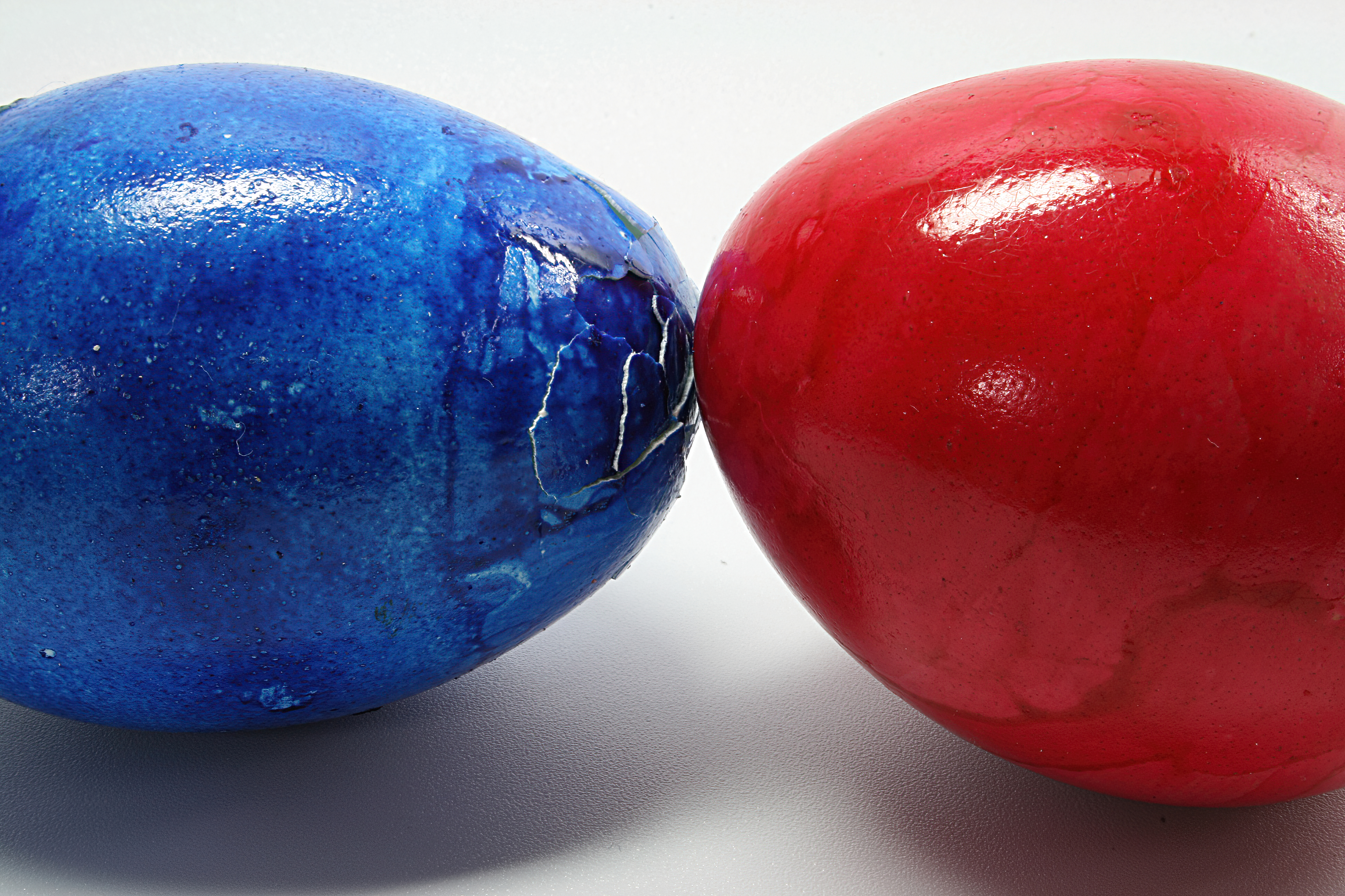 Ostereien nach dem Ostereiertitschen